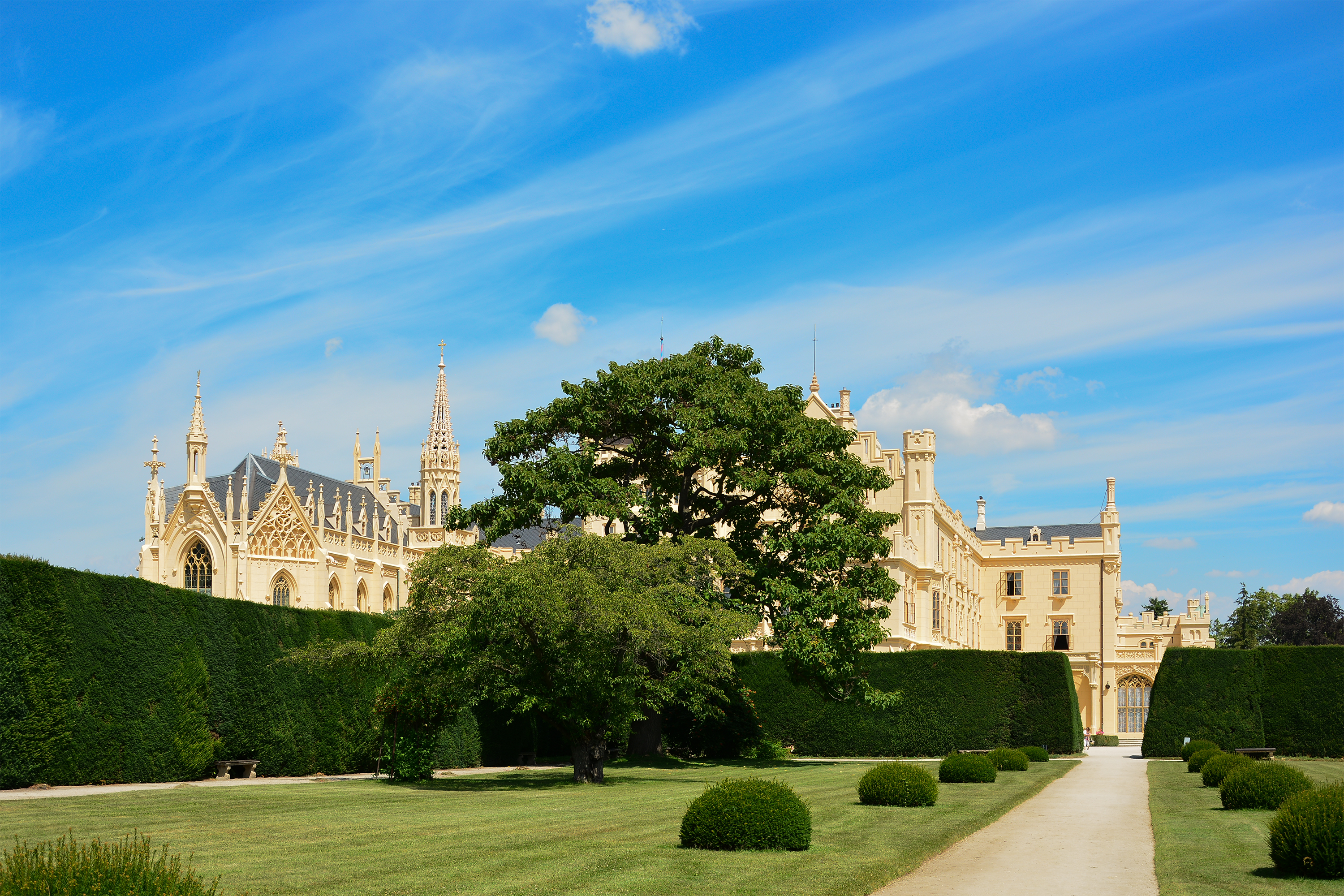 Lednicko Valtický areál